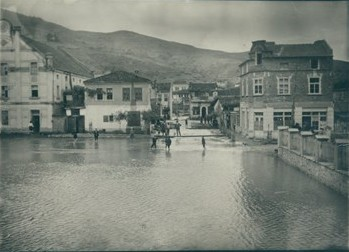 Наводнението в Станимака (дн. Асеновград), 13 май 1924 г.